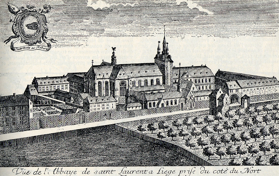 L'abbaye de Saint-Laurent (Liège) au XVIIIe siècle. Gravure extraite de Saumery. Libre de droit.